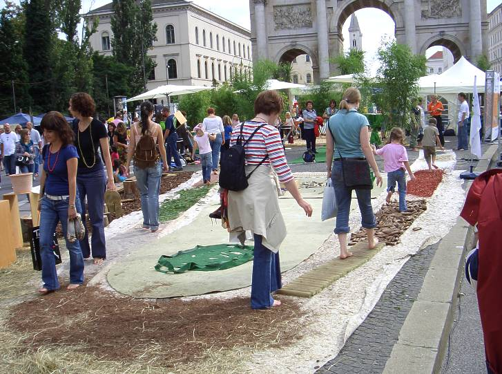 Barfußpark Streetlife-Festival München Sep 2006